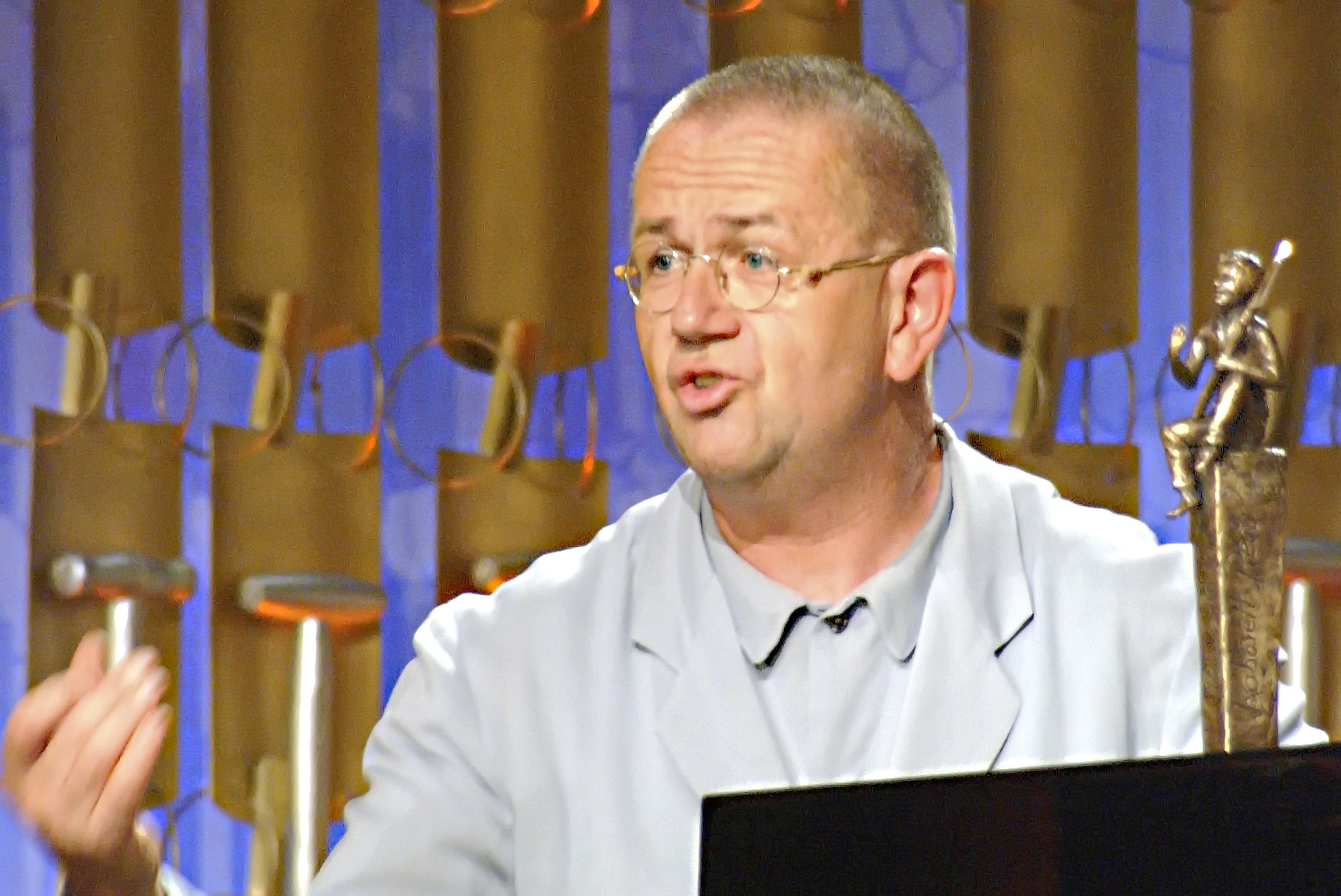 Hans Liberg erhält den Bayerischen Kabarettpreis 2003